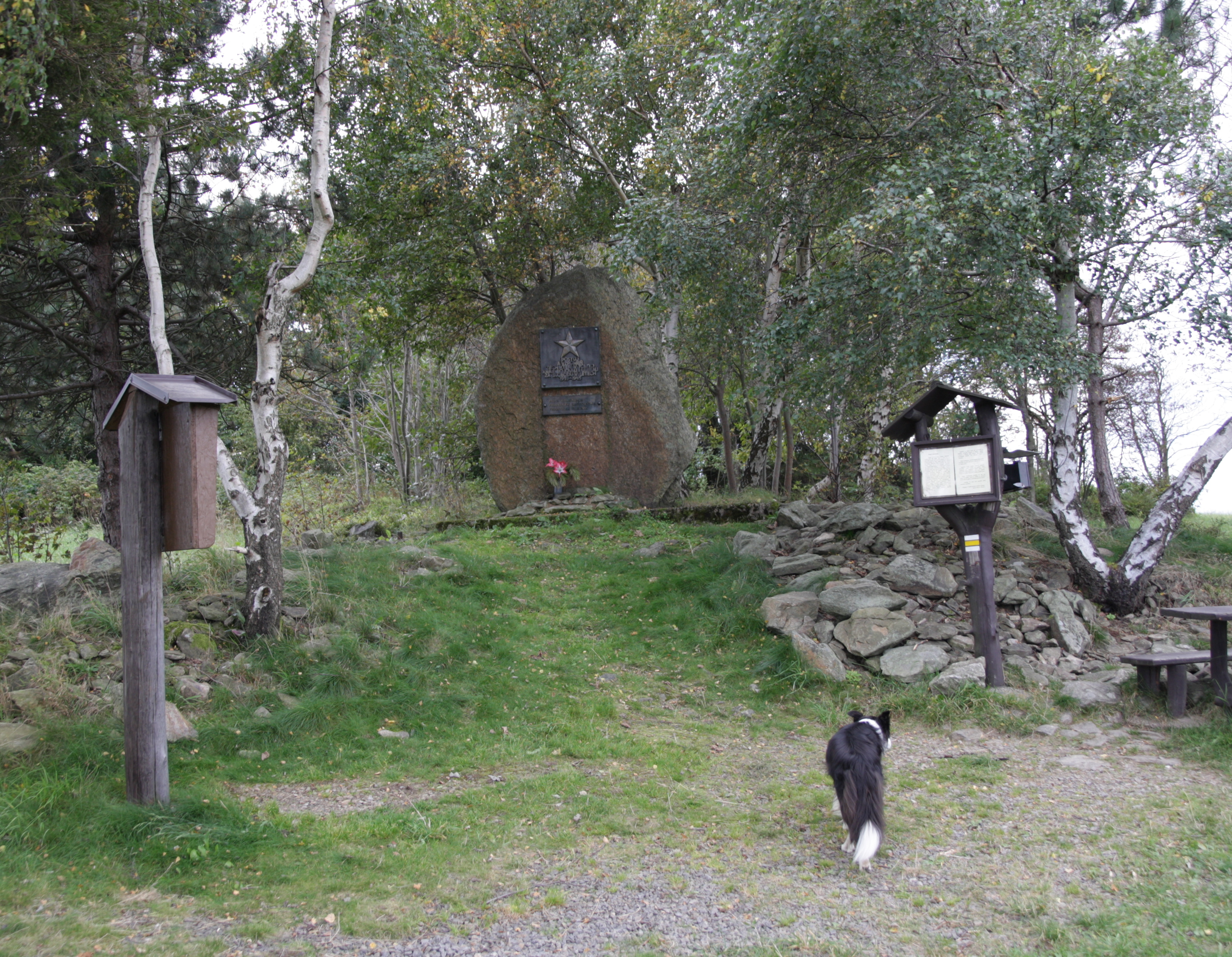 Věcov - partyzánský pomník na vrchu Metodka.